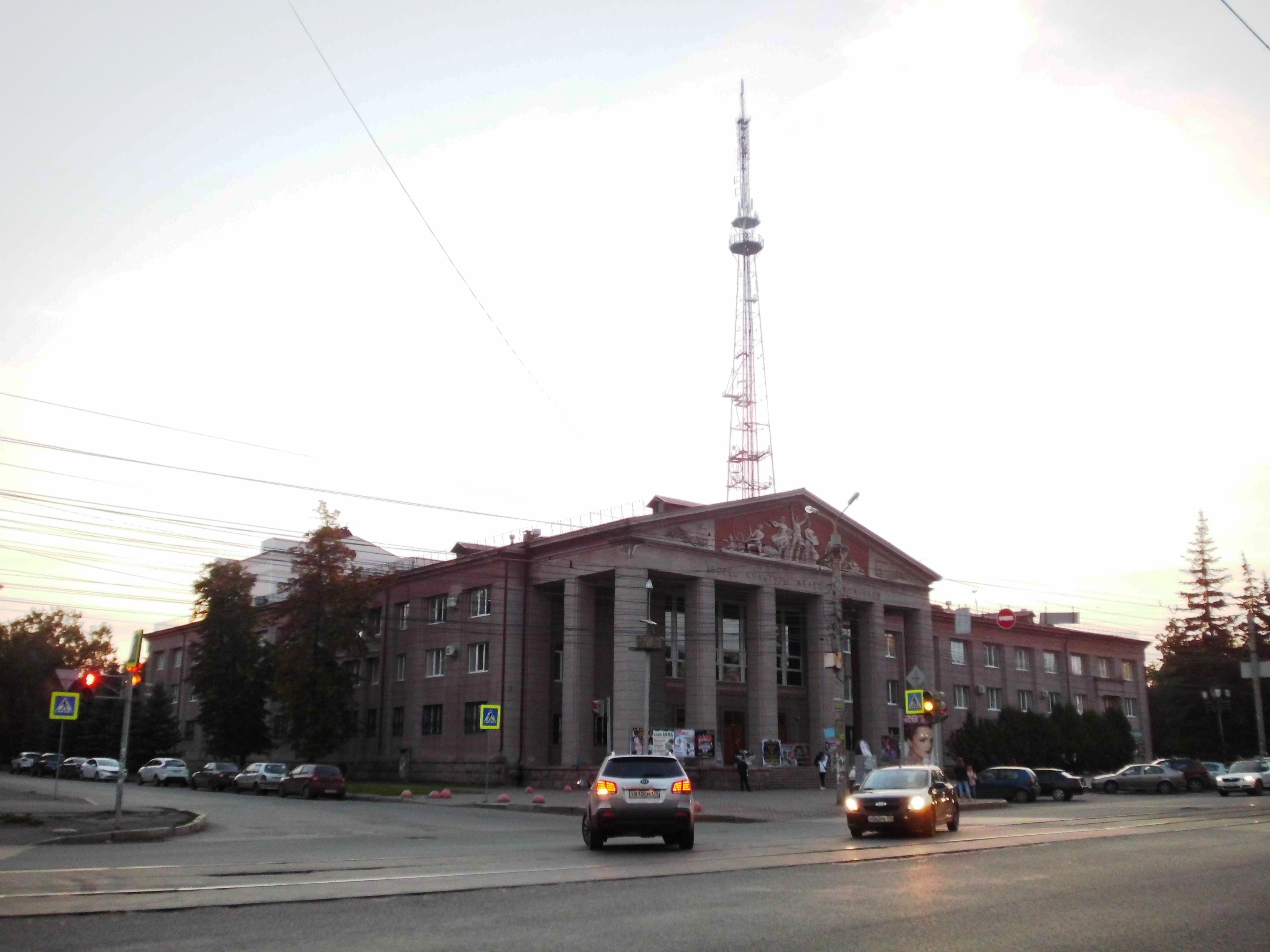 Дворец культуры железнодорожников: улица Цвиллинга, 54, Челябинск, Челябинская область.